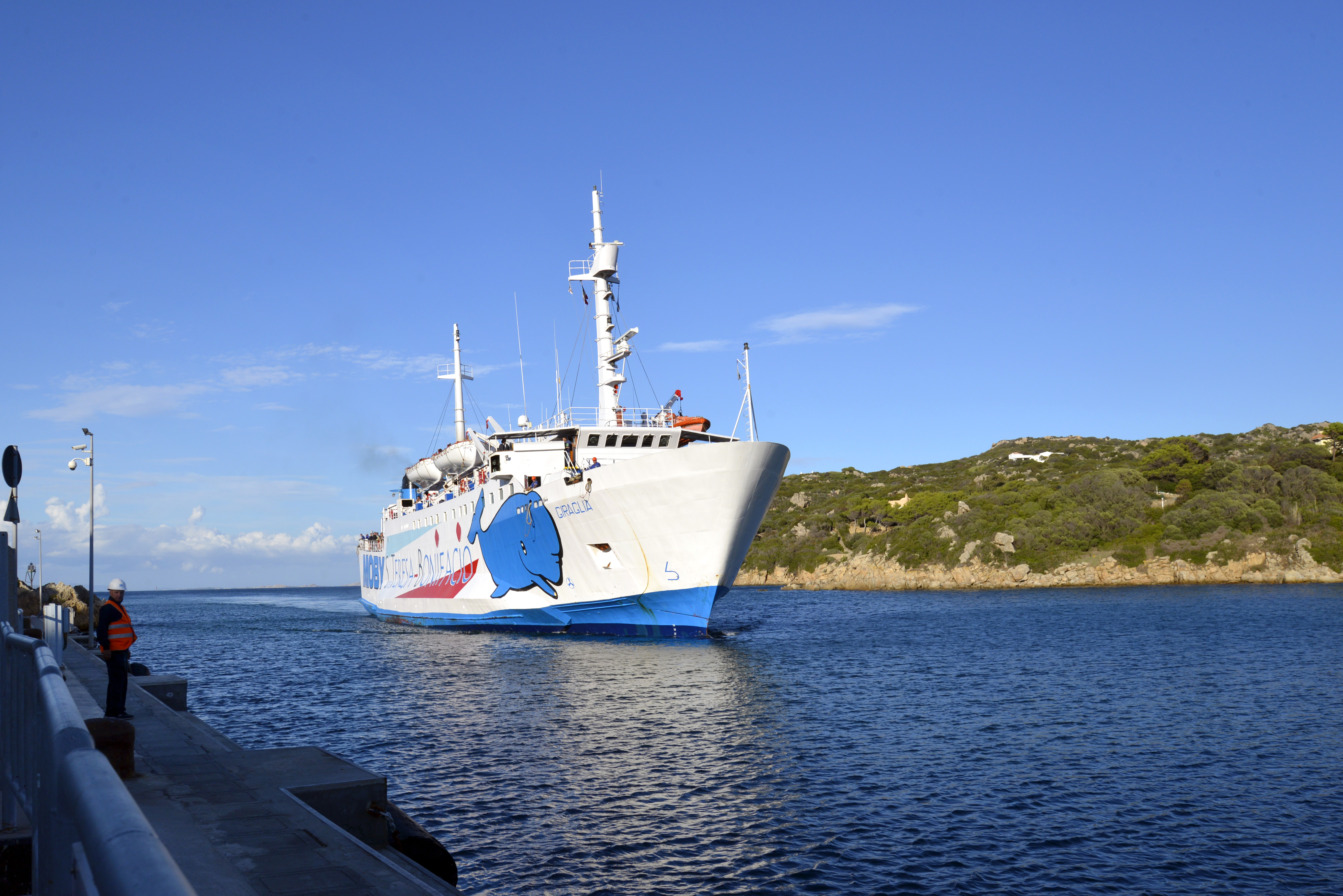 Santa Teresa Gallura, Sardaigne (Italie) - Ferry Giraglia de la Moby Lines entrant au port